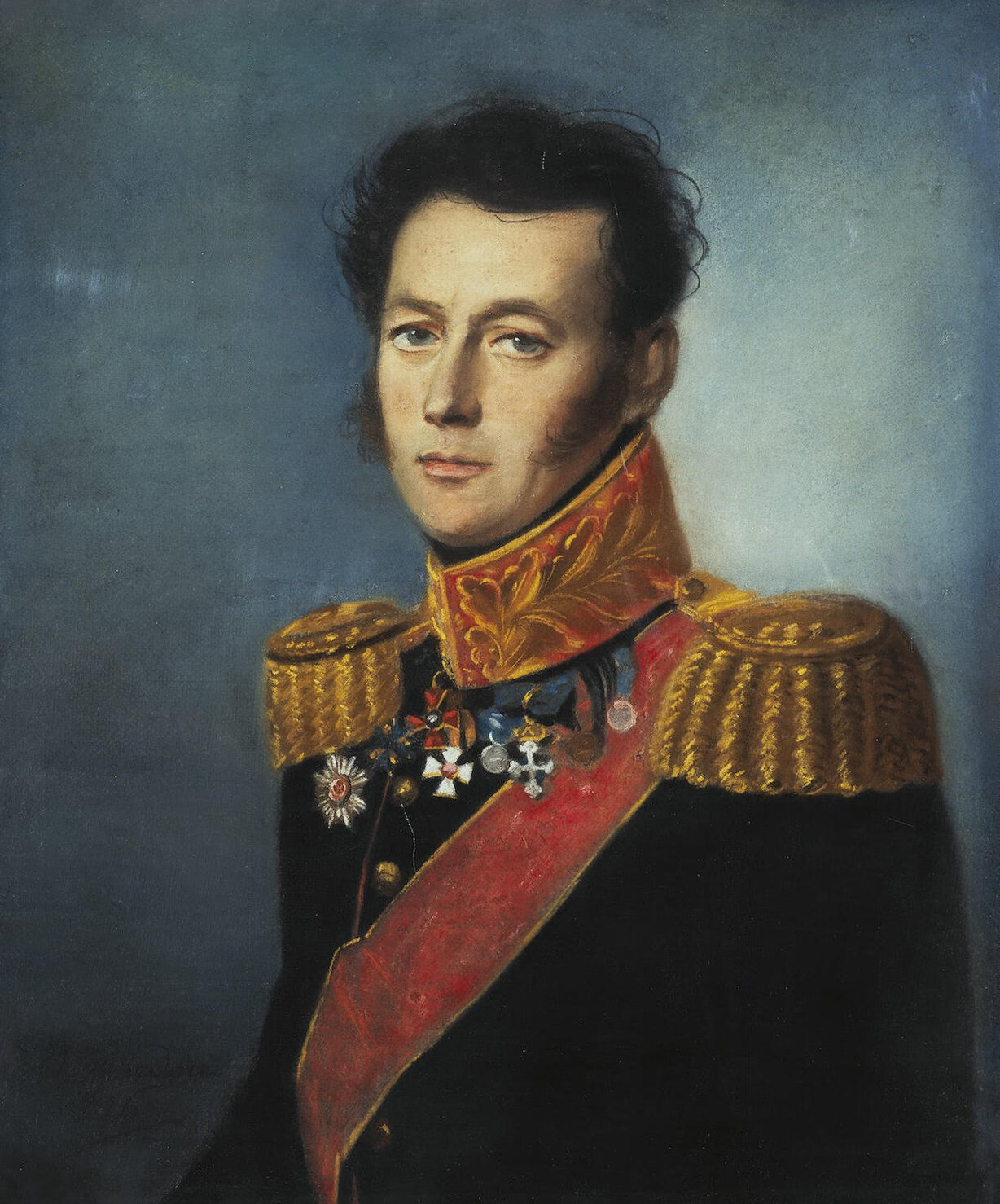 ? Portrait of Ivan Skobelev, Russian general